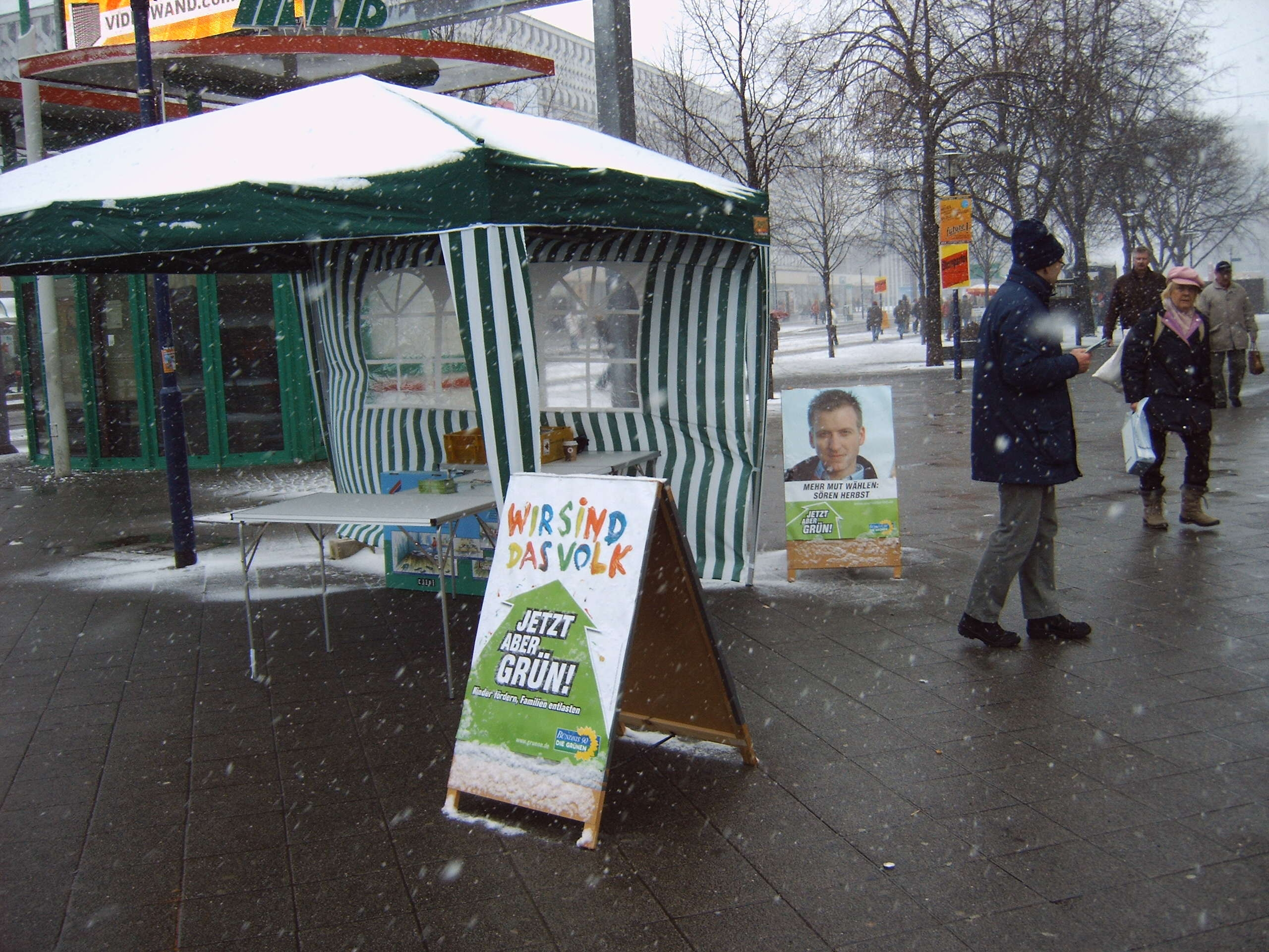 Wahlkampfstand der Partei Bündnis 90/Die Grünen zur Landtagswahl in Sachsen-Anhalt 2006 in der Magdeburger Innenstadt, Winterwahlkampf, es liegt Schnee auf der Standüberdachung, Bild aufgenommen am 11.3.2006